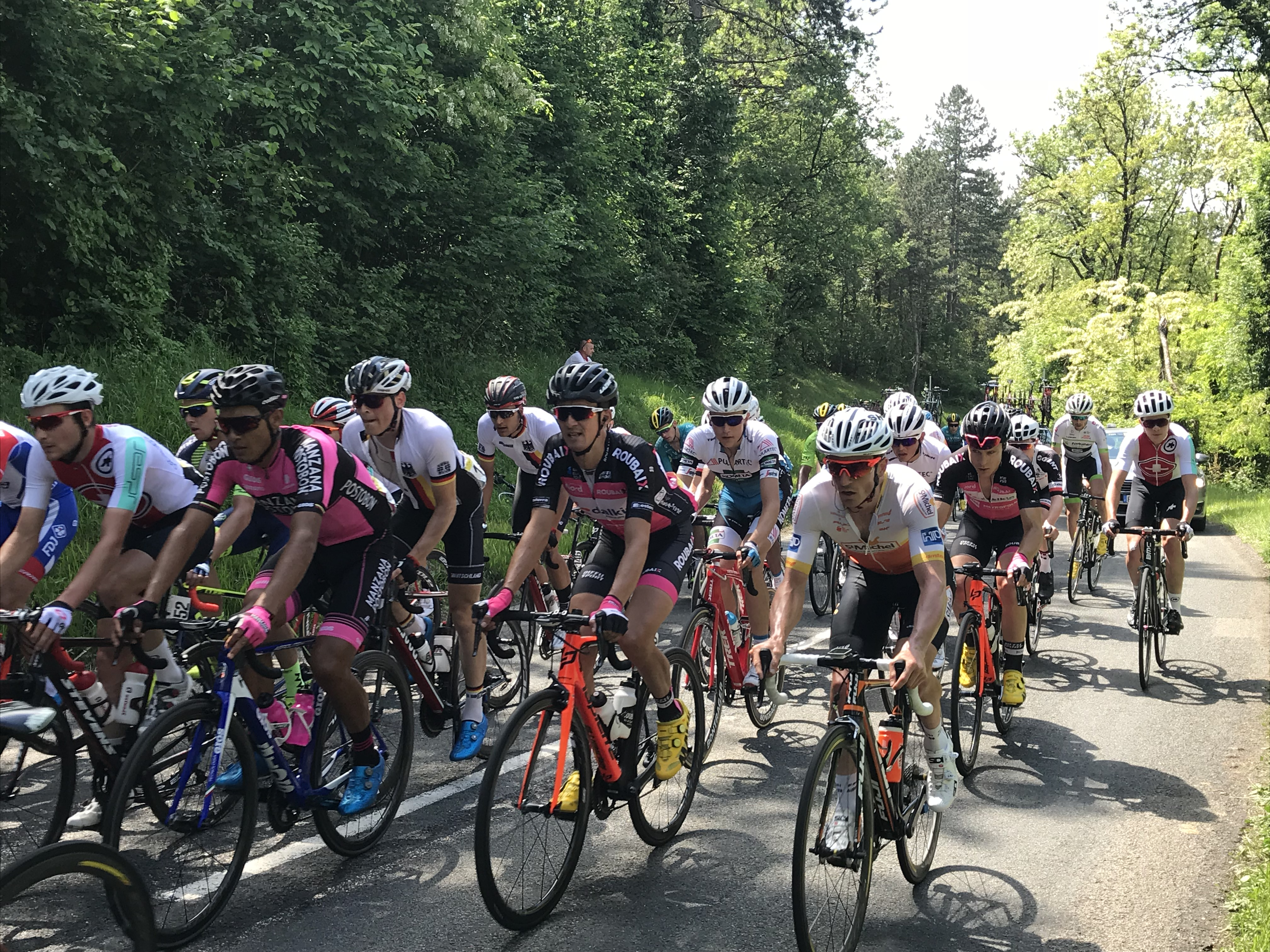 2e étape du Tour de l'Ain 2018 - ascension de la Côte de Treffort (gpm km 44) à Treffort-Cuisiat.